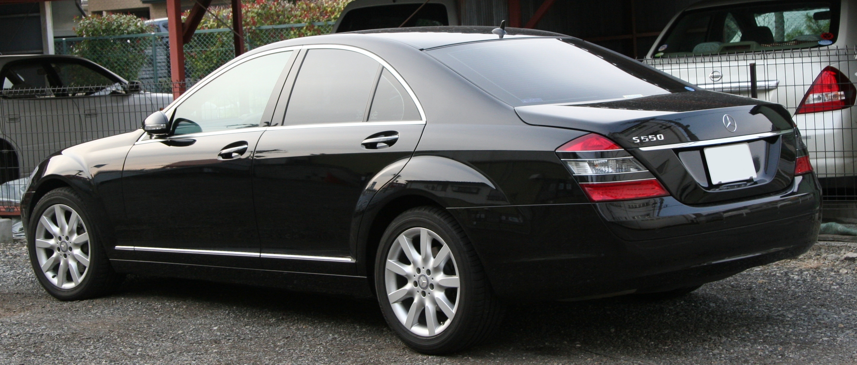 Mercedes-Benz S-Class